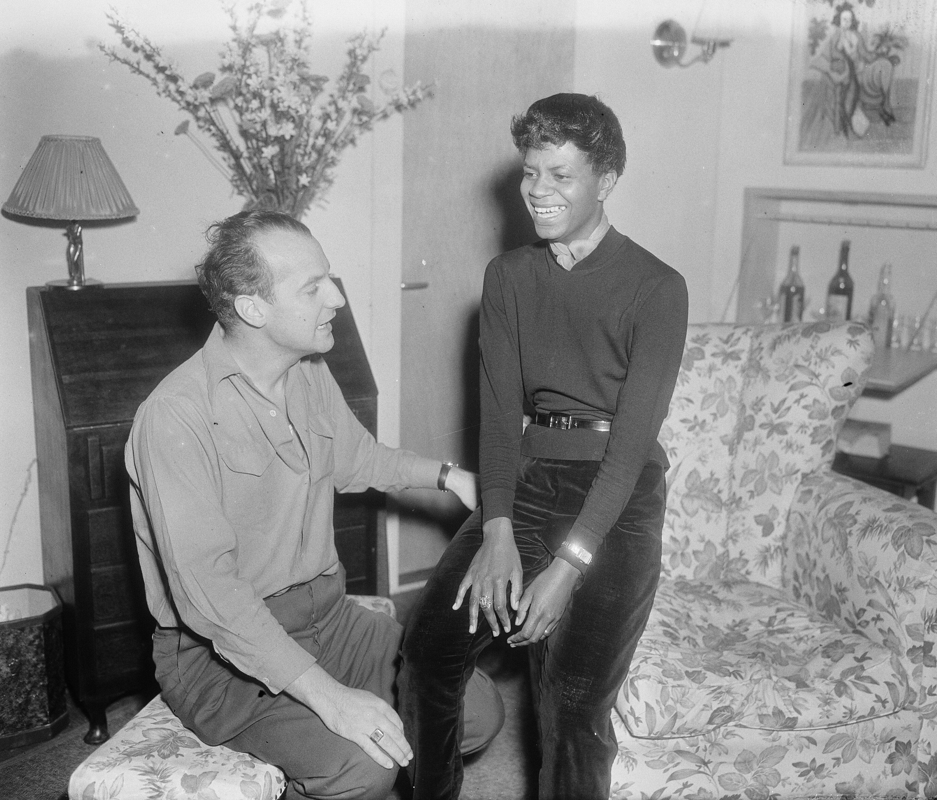 Collectie / Archief : Fotocollectie Anefo Reportage / Serie : [ onbekend ] Beschrijving : Zangeres Enid Mosier in Amsterdam Annotatie : Calypso-zangeres. Rechts van haar Wim Sonneveld Datum : 30 juli 1952 Locatie : Amsterdam, Noord-Holland Trefwoorden : cabaretiers, zangeressen Persoonsnaam : Mosier, Enid, Sonneveld, Wim Fotograaf : Pot, Harry / Anefo, [onbekend] Auteursrechthebbende : Nationaal Archief Materiaalsoort : Glasnegatief Nummer archiefinventaris : bekijk toegang 2.24.01.09 Bestanddeelnummer : 905-2458 Reacties Geplaatst door Cabaret liefhebber op 06 augustus 2017 - 19:14. NB. Deze Amerikaanse cabaretière trad op in het programma 'Gastenboek' van Wim Sonneveld in het Leidseplein Theater